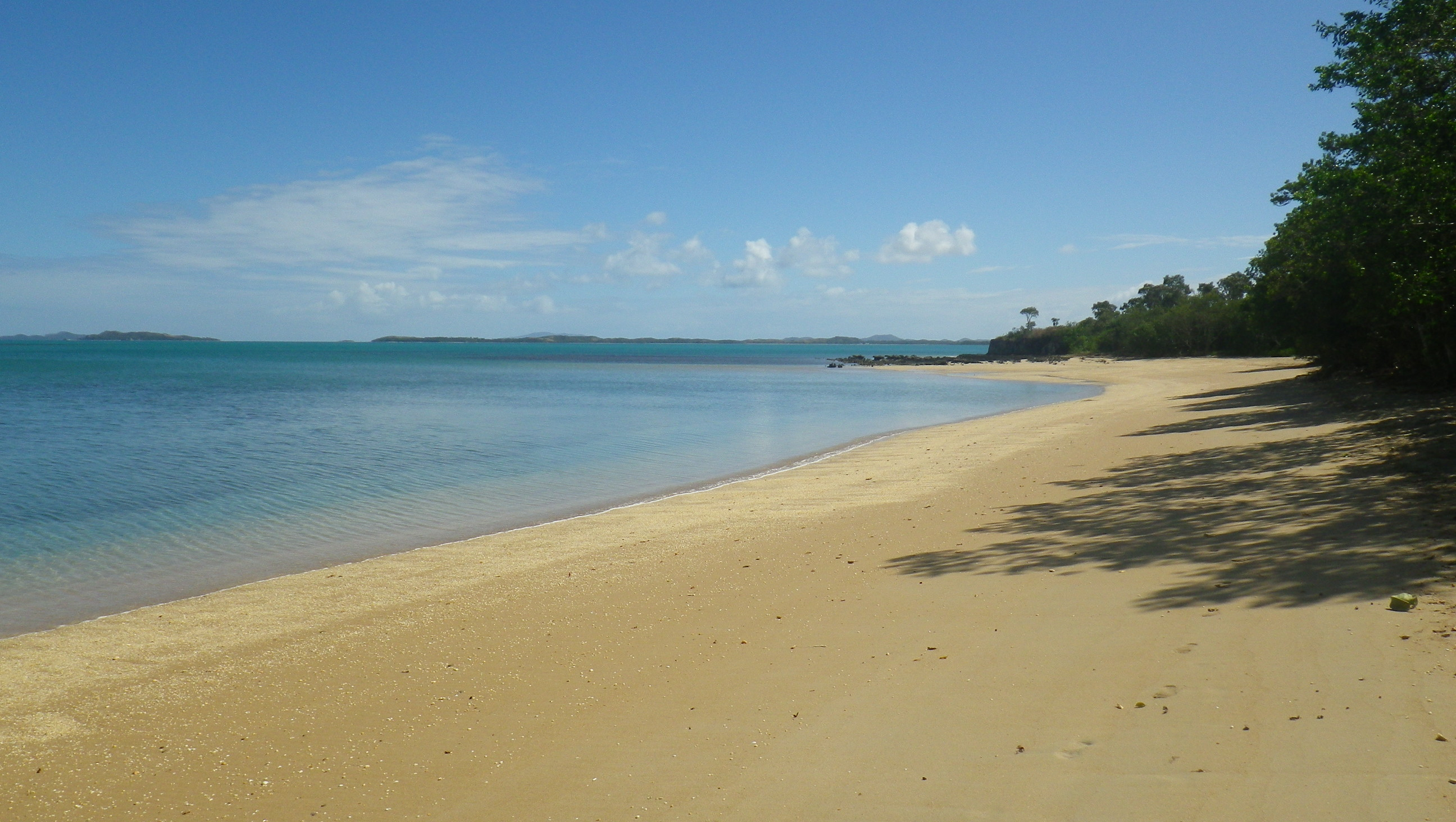 Plage de Nennon